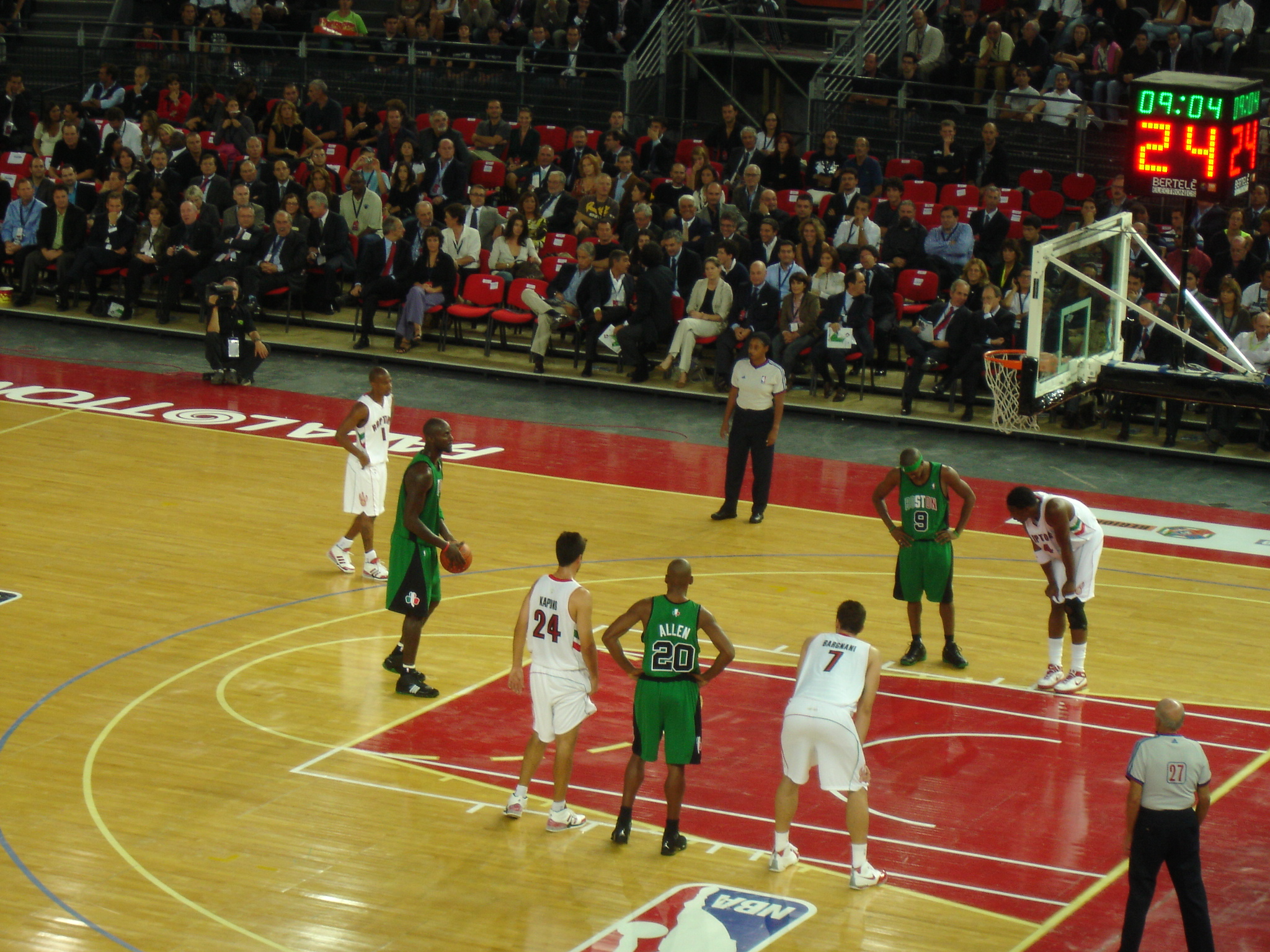 Kevin Garnett al PalaLottomatica